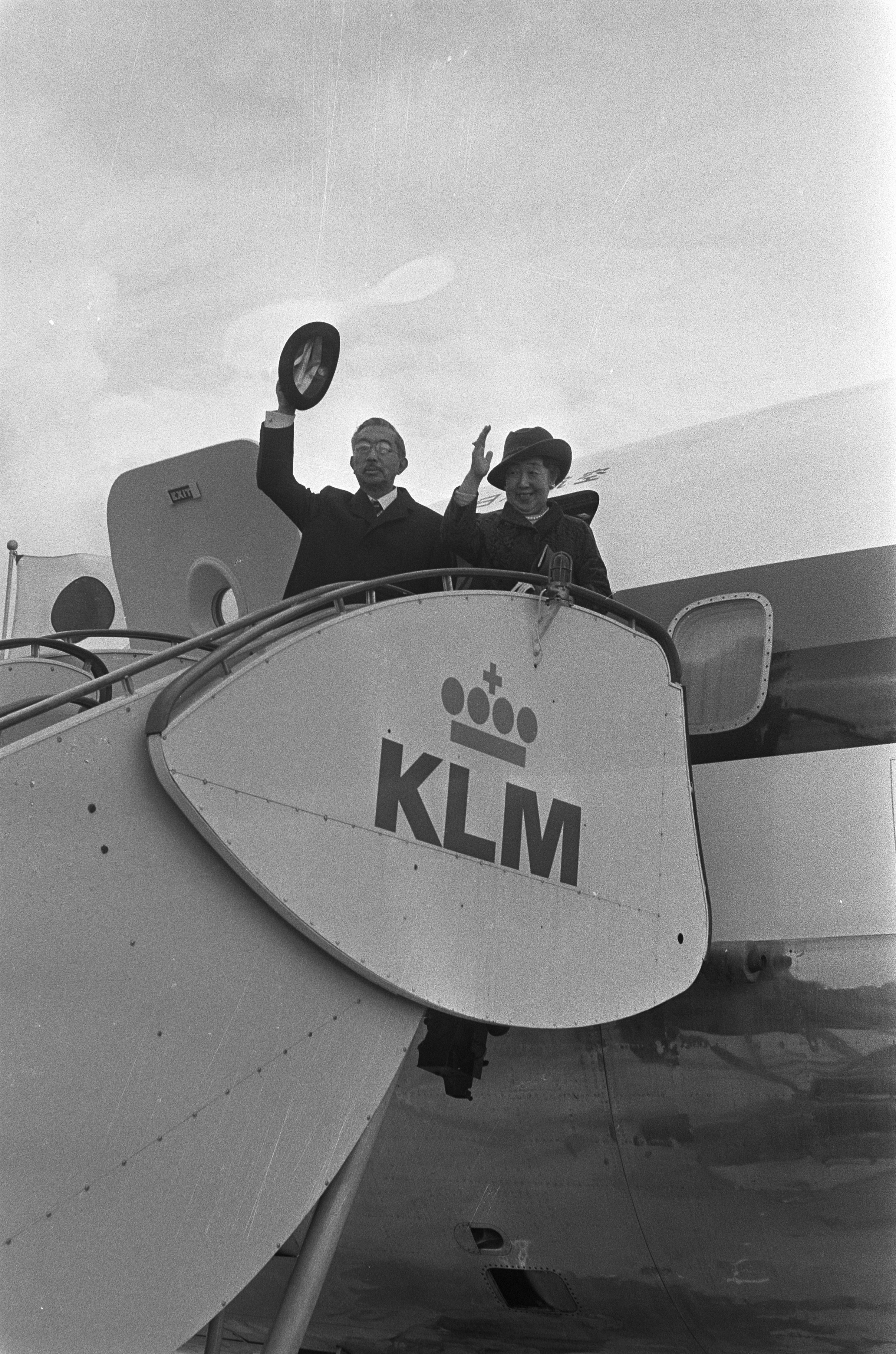 Collectie / Archief : Fotocollectie Anefo Reportage / Serie : [ onbekend ] Beschrijving : Keizer Hirohito en echtgenote vertrekken van Schiphol, Keizer en echtgenote op vliegtuigtrap Datum : 10 oktober 1971 Locatie : Noord-Holland, Schiphol Trefwoorden : KEIZER, keizersINNEN, vertrekken, vliegtuigtrappen Persoonsnaam : Hirohito, keizer van Japan Fotograaf : Verhoeff, Bert / Anefo Auteursrechthebbende : Nationaal Archief Materiaalsoort : Negatief (zwart/wit) Nummer archiefinventaris : bekijk toegang 2.24.01.05 Bestanddeelnummer : 925-0314